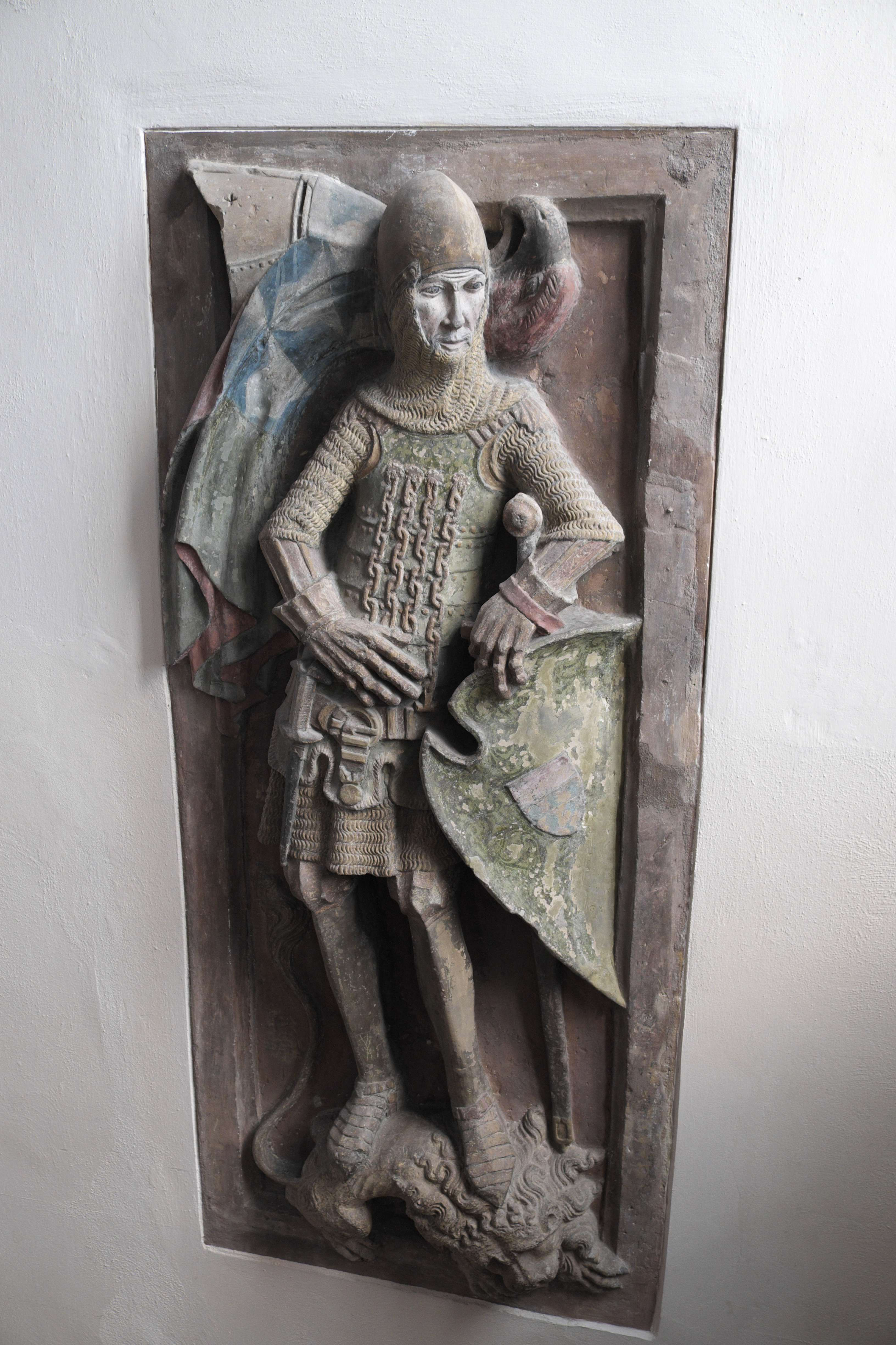 Evangelische Stadtkirche St. Blasius in Bopfingen, einer Stadt im Ostalbkreis (Baden-Württemberg), Grabmal des Ritters Walter von Bopfingen, von 1336